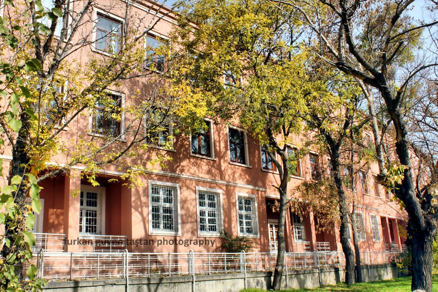 Ankara Lisesi 2012